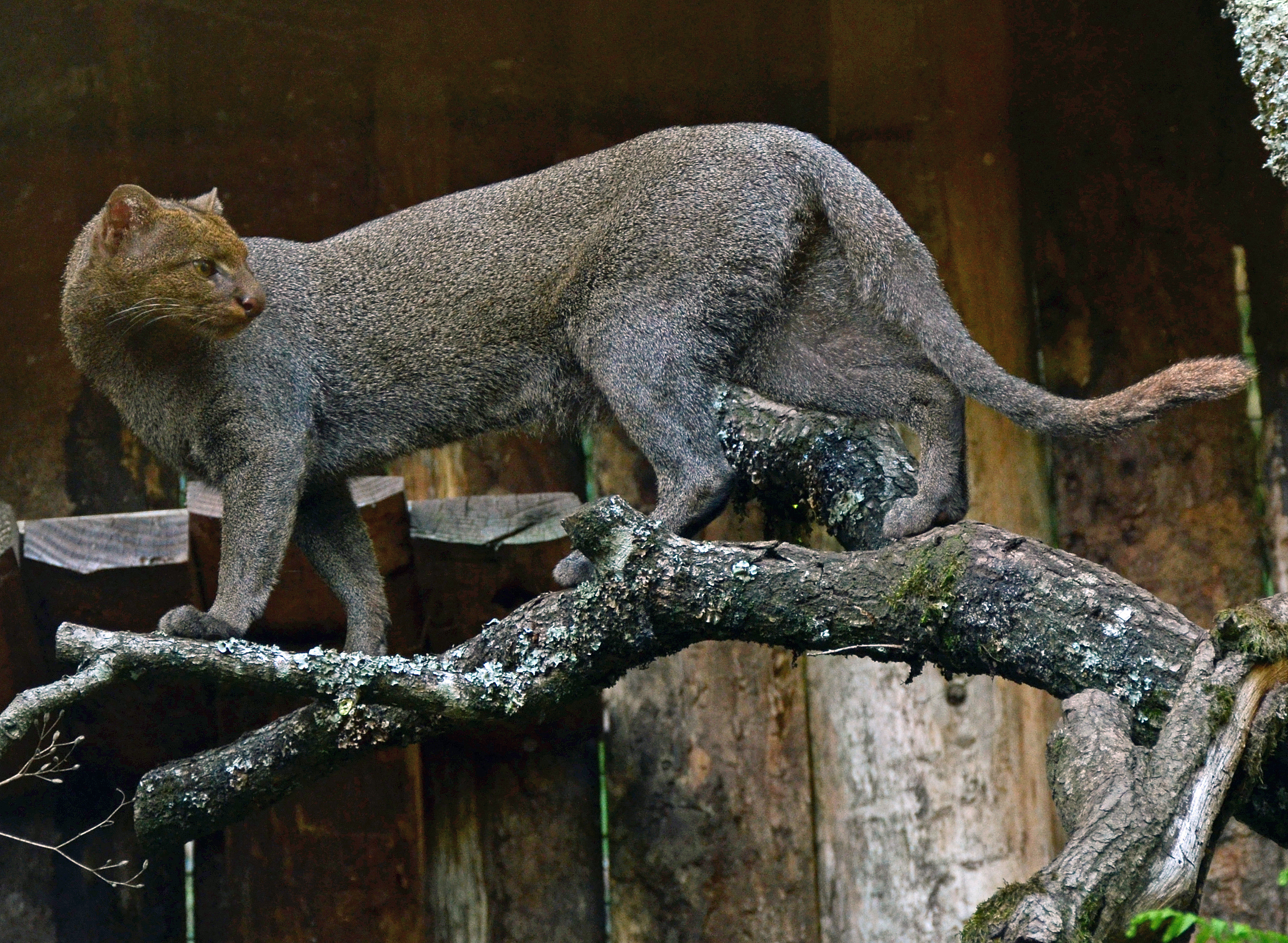 Jaguarundi ( Puma yagouaroundi ) au zoo de Pont-Scorff.